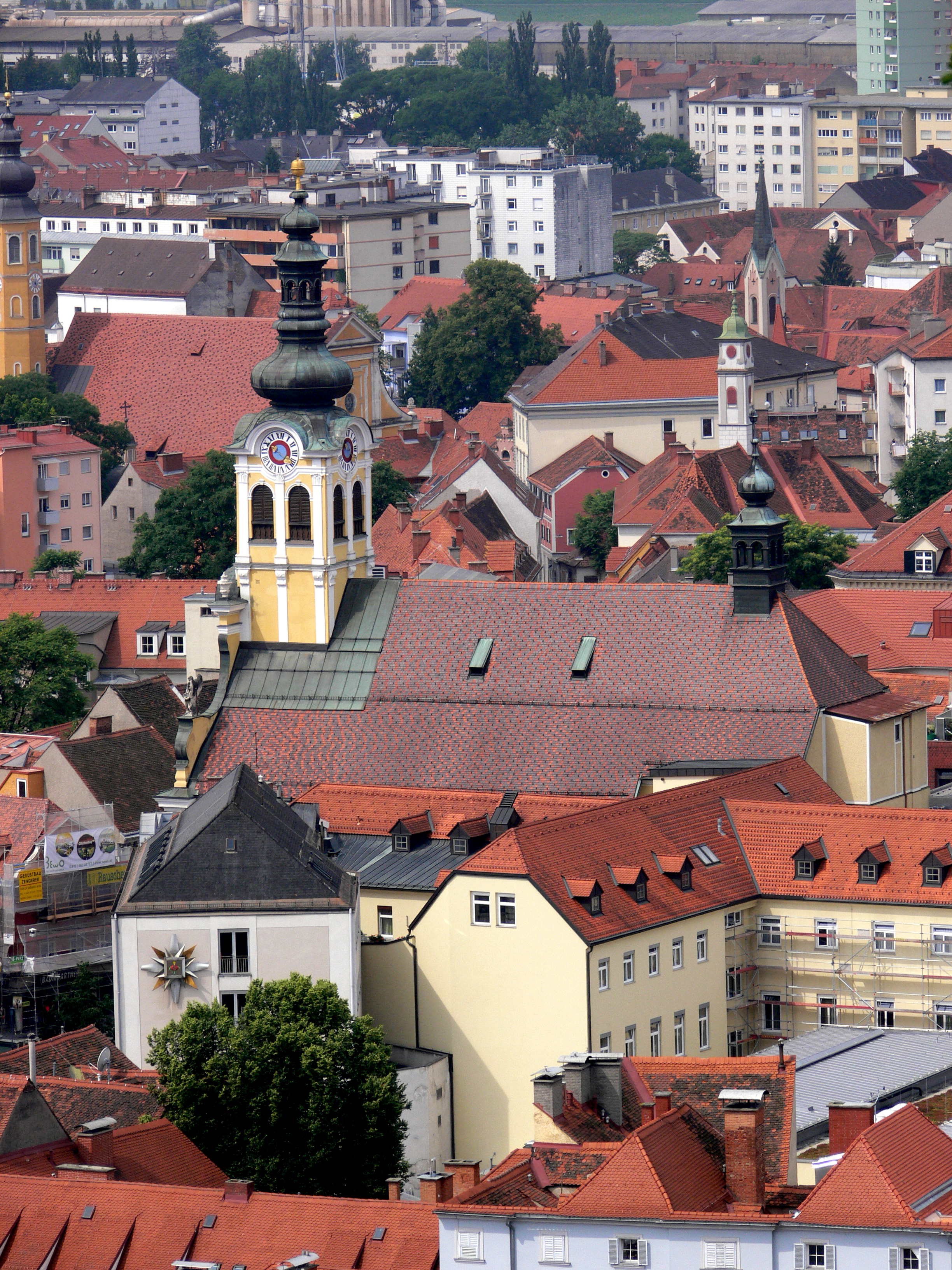 Barmherzigenkirche, Graz, gesehen vom Schlossberg